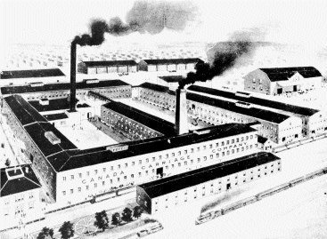 The Canada Carriage Company at Brockville (Ontario), before 1909. The Company made horse-drawn sleighs, phaetons, and agons.. It became Canada Carriage Factories in 1909, and made then automobile coachwork, too, and built about 80 Brockville 30 cars. Such production was outsourced after 1911 to subsidiaries Brockville-Atlas and later Brockville-Briscoe.